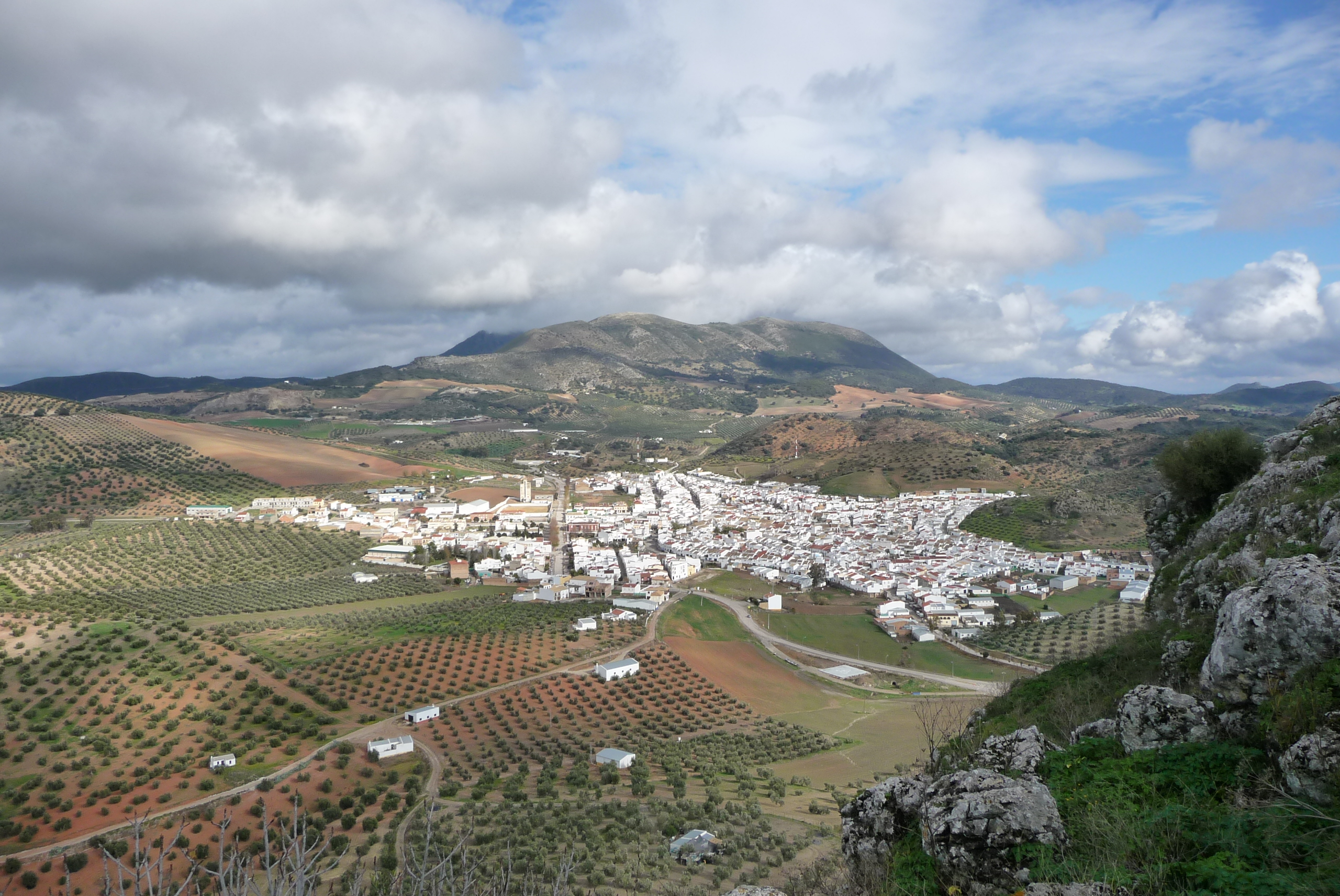 Pruna-p1000492.jpg